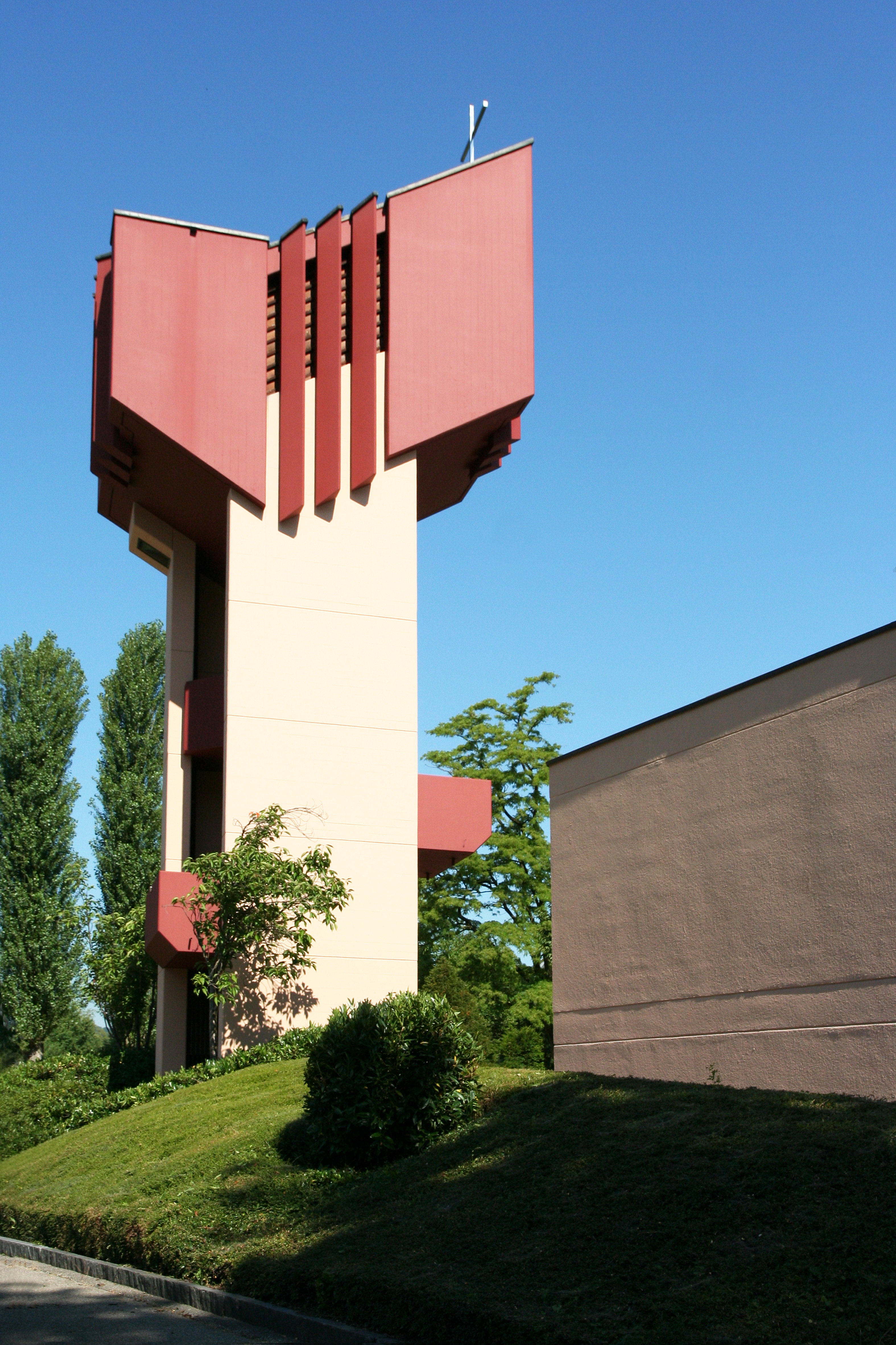 Römisch-katholische Pfarrkirche St. Martin Birmensdorf ZH